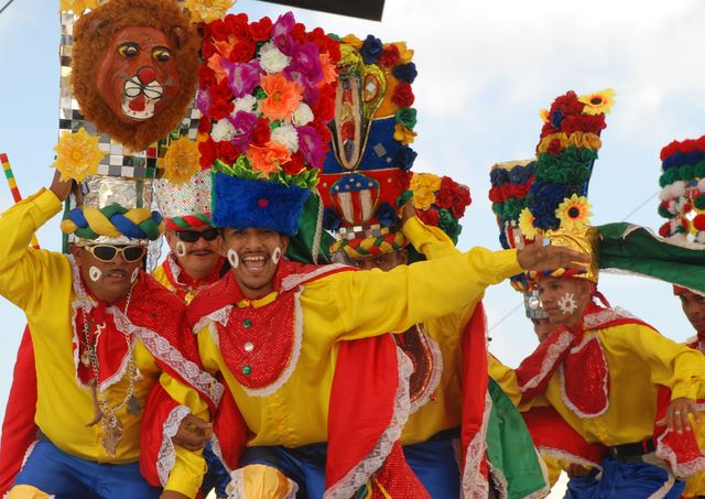 Congo, personaje representativo del Carnaval de Barranquilla